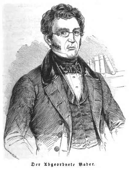 Johann Sebastian Bader, Abgeordneter des badischen Landtages, 1847.